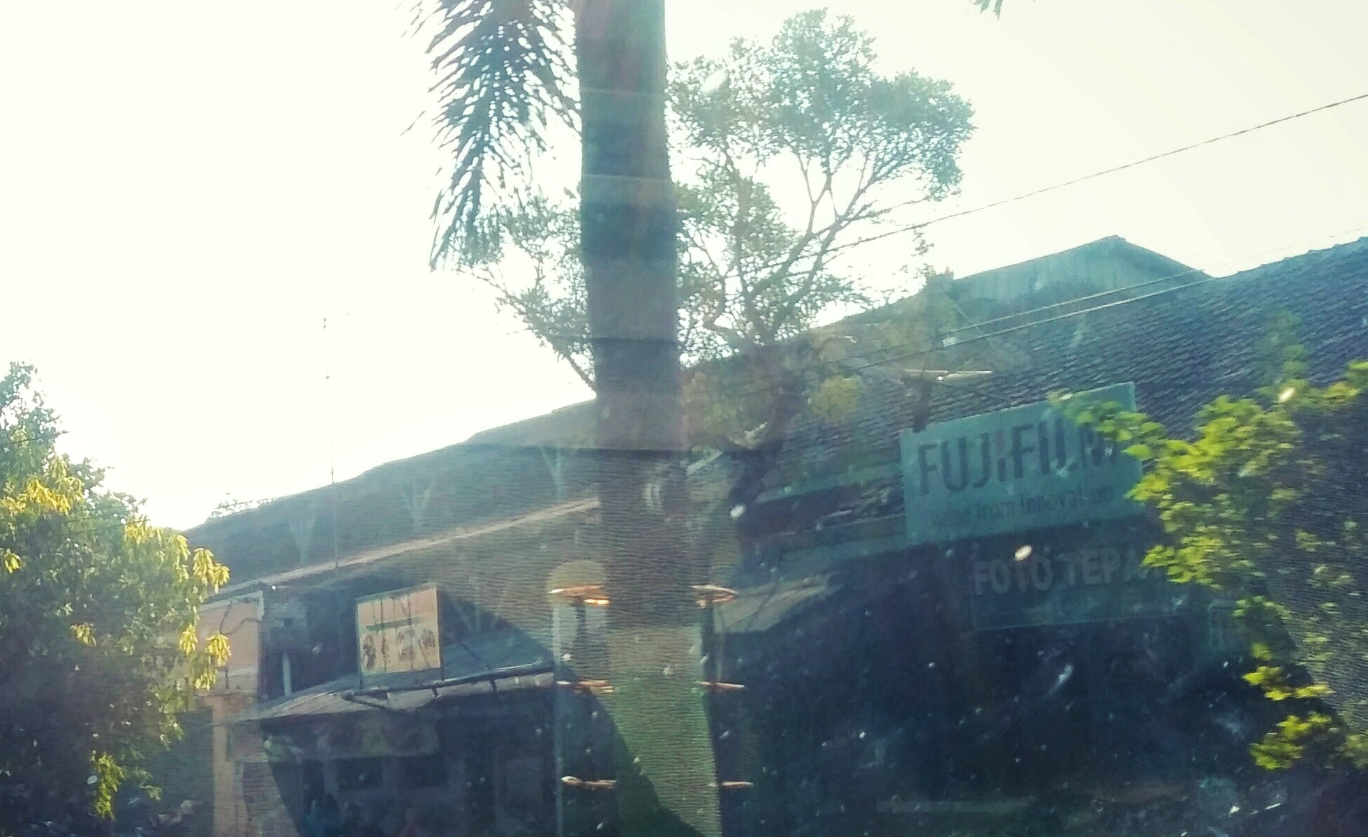 Samar-samar terlihat pilar-pilar penyangga kanopi Stasiun Pati.